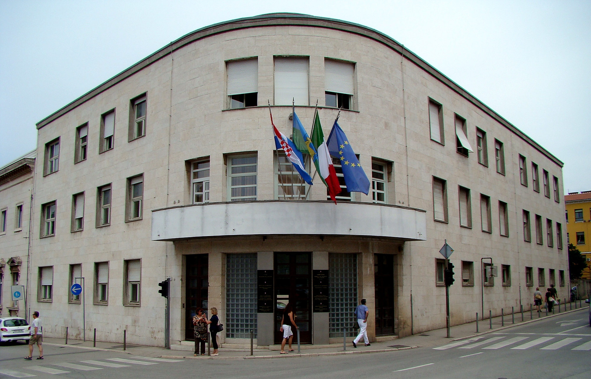 Arhitektura u Puli iz razdoblja talijanske uprave (1918-1943)